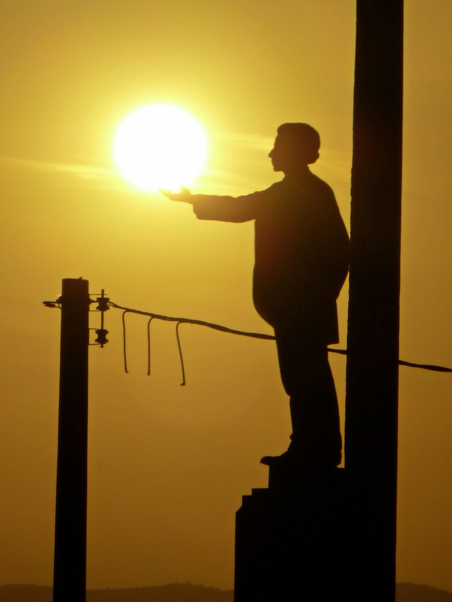 Denkmal Castro Alves Sonnenuntergang Savlador Bahia